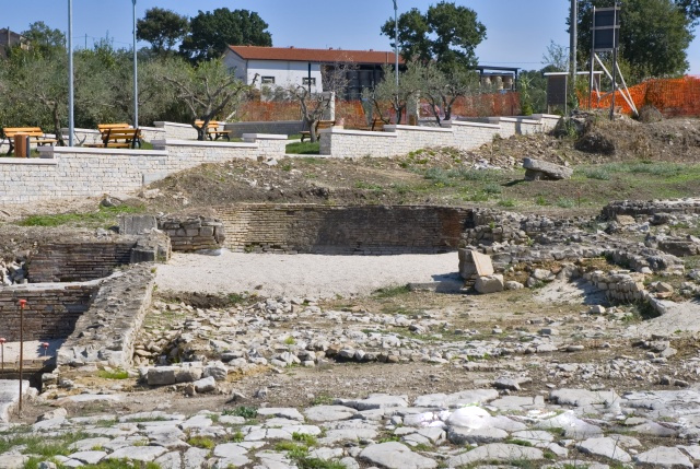 Area archeologica in località Macchia, Circello (BN), Italia. Qui, nel II sec. a.C. il console Bebio deportò, a più riprese, circa 50.000 Liguri che avevano combattuto contro i Romani nelle Alpi Apuane.